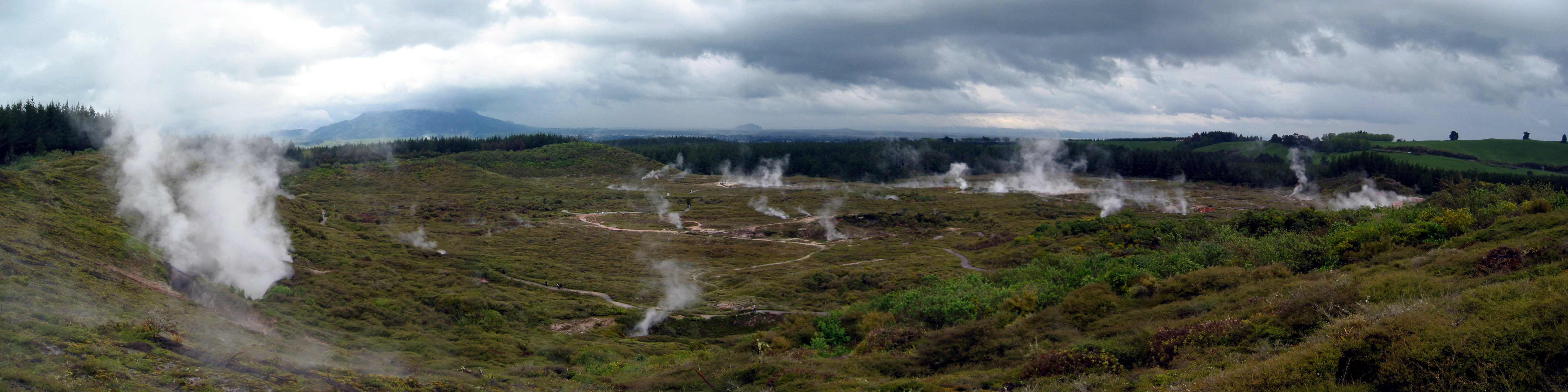 Craters of the Moon (Karapiti), Taupo, New Zealand. Compositiefoto gemaakt tijdens onze vakantie in 2004